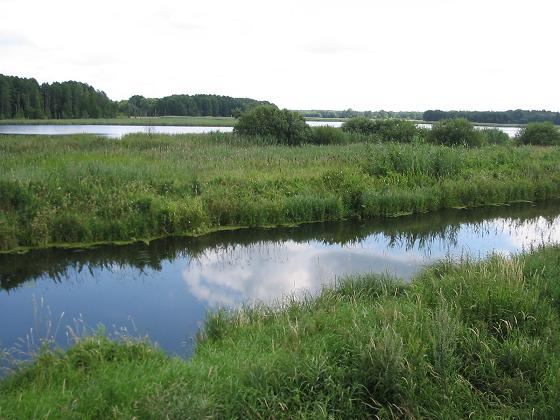 Pfefferfließ, neuer See, Stangenhagen, Brandenburg